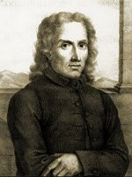 Leonardo Leo